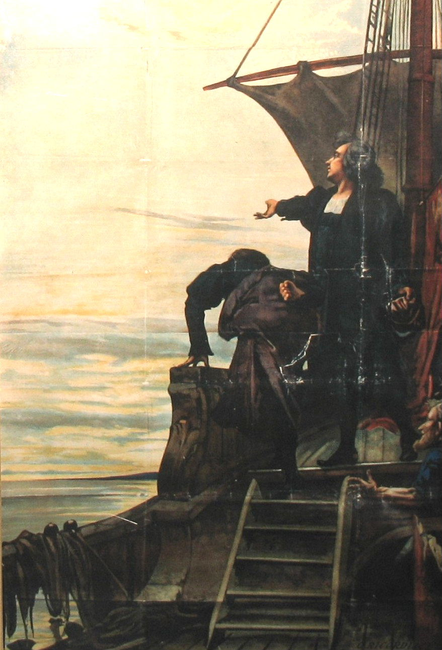 Immagine da Genova, Italia. Particolare di manifesto per l'Esposizione Italo-Americana del 1892 in occasione del quattrocentenario della scoperta dell'America.